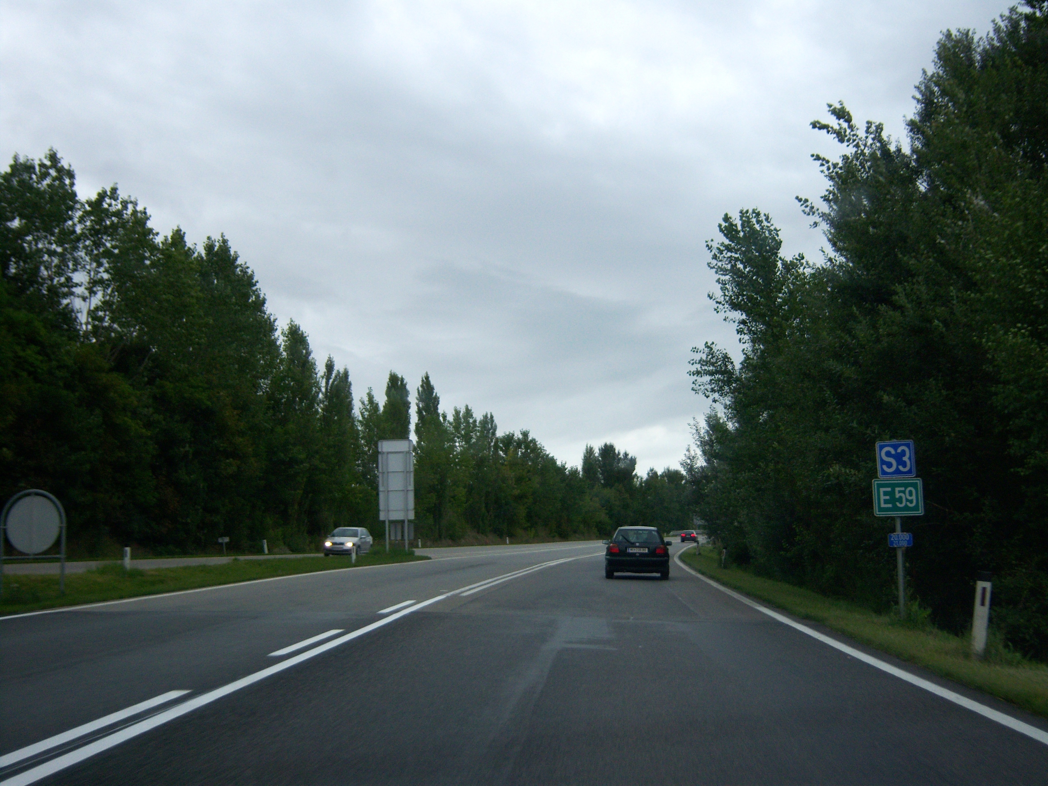 Übergang von der Weinviertler Straße B303 auf die Weinviertler Schnellstraße S3 bei der Anschlussstelle Hollabrunn-Süd